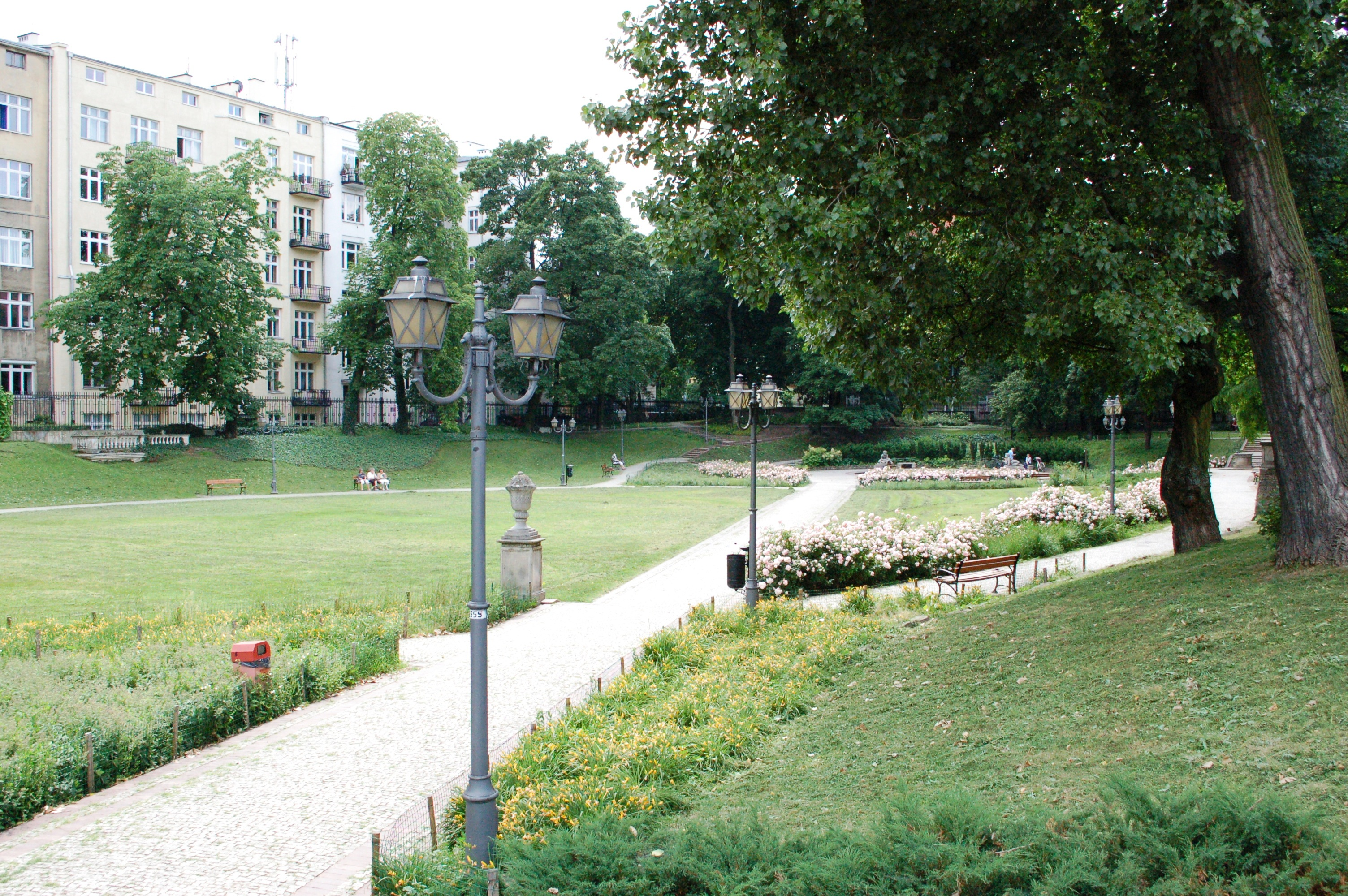 Warschau